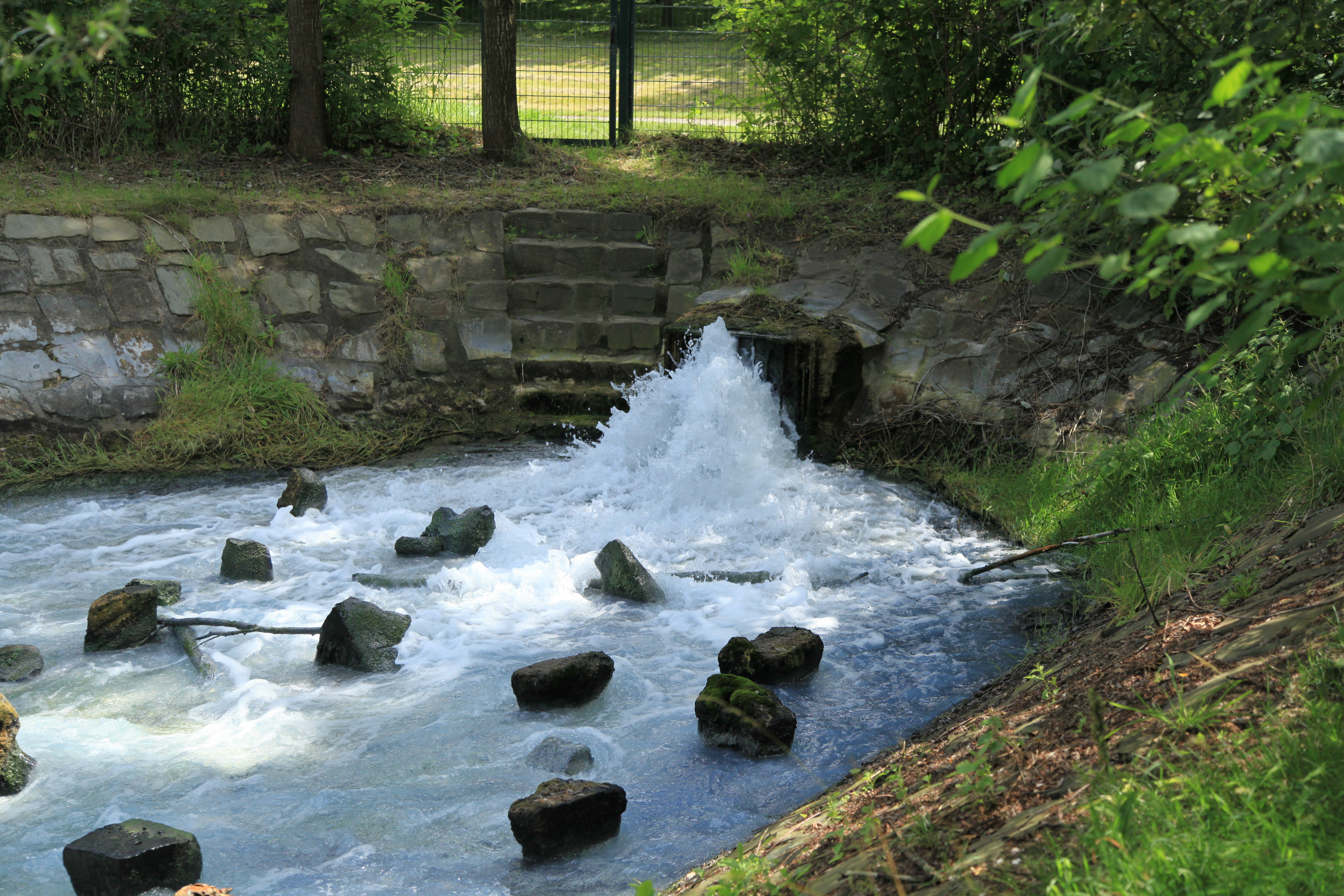 Einleitung des von Schacht Arnold der Zeche Heinrich Gustav bzw. Zeche Robert Müser abgepumpten Grubenwassers in die Harpener Teiche, Werner Straße in Bochum